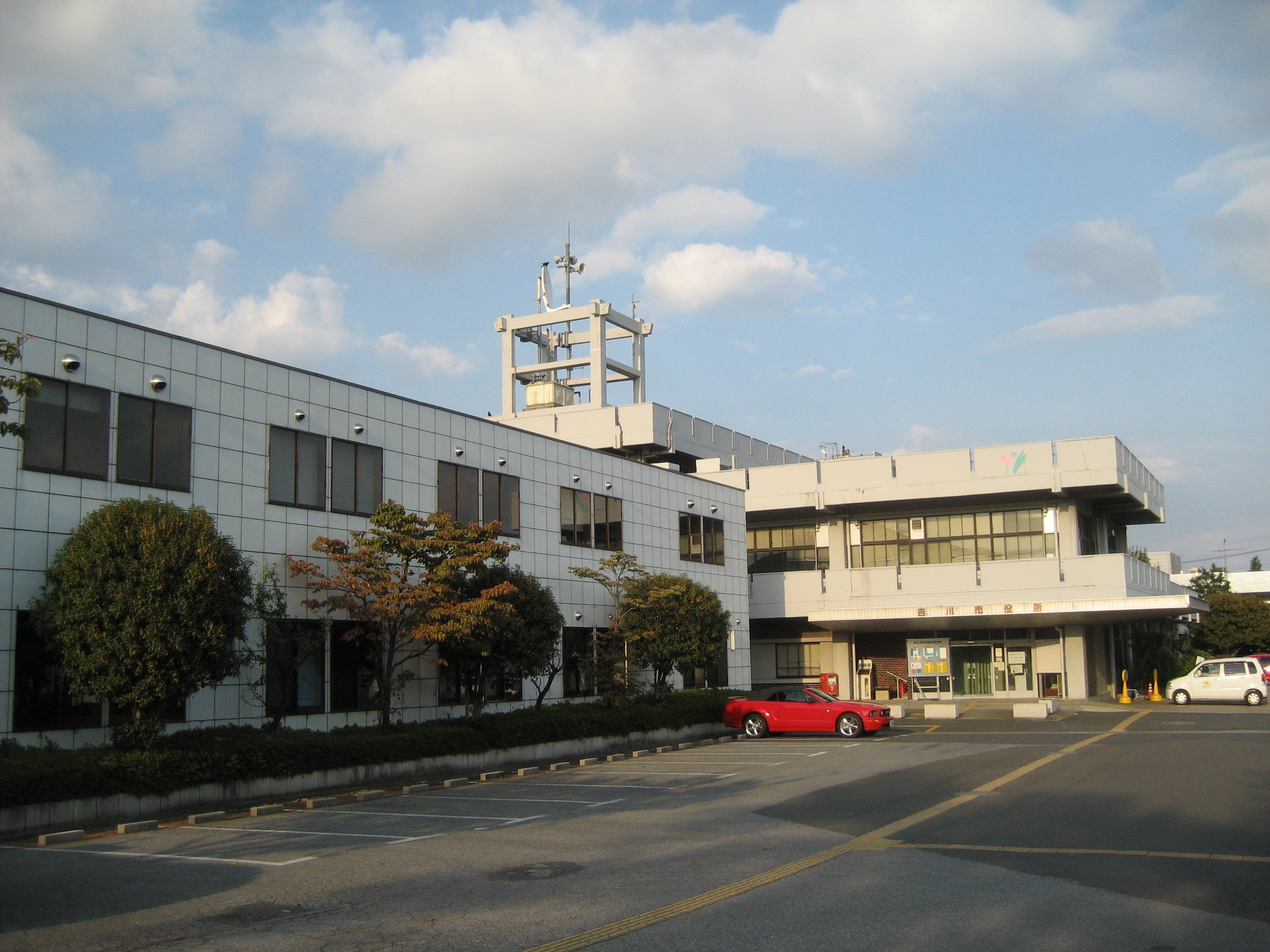 吉川市役所庁舎